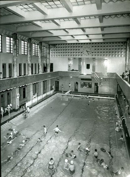 Torggata bad. Svømmehallen med badende mennesker. Svømmeopplæring. Bildet tatt fra galleriet mot kontrollrommet. Kvinnelig badebetjening. Stupetårn med kun en tremeter.